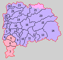 愛知県額田郡の町村制時点の町村。